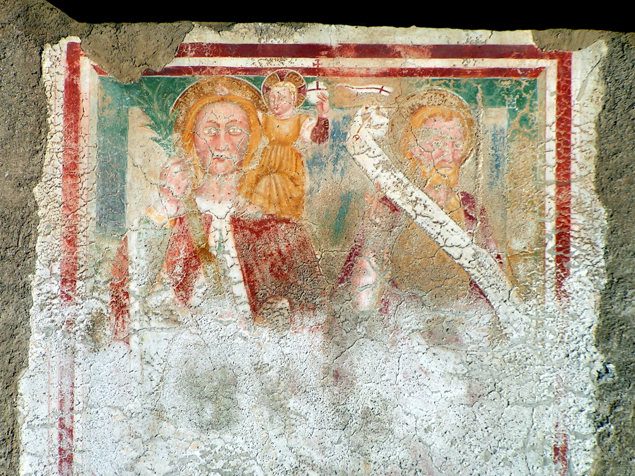 Chiesa dei Santi Gervasio e Protasio affresco tardo gotico.